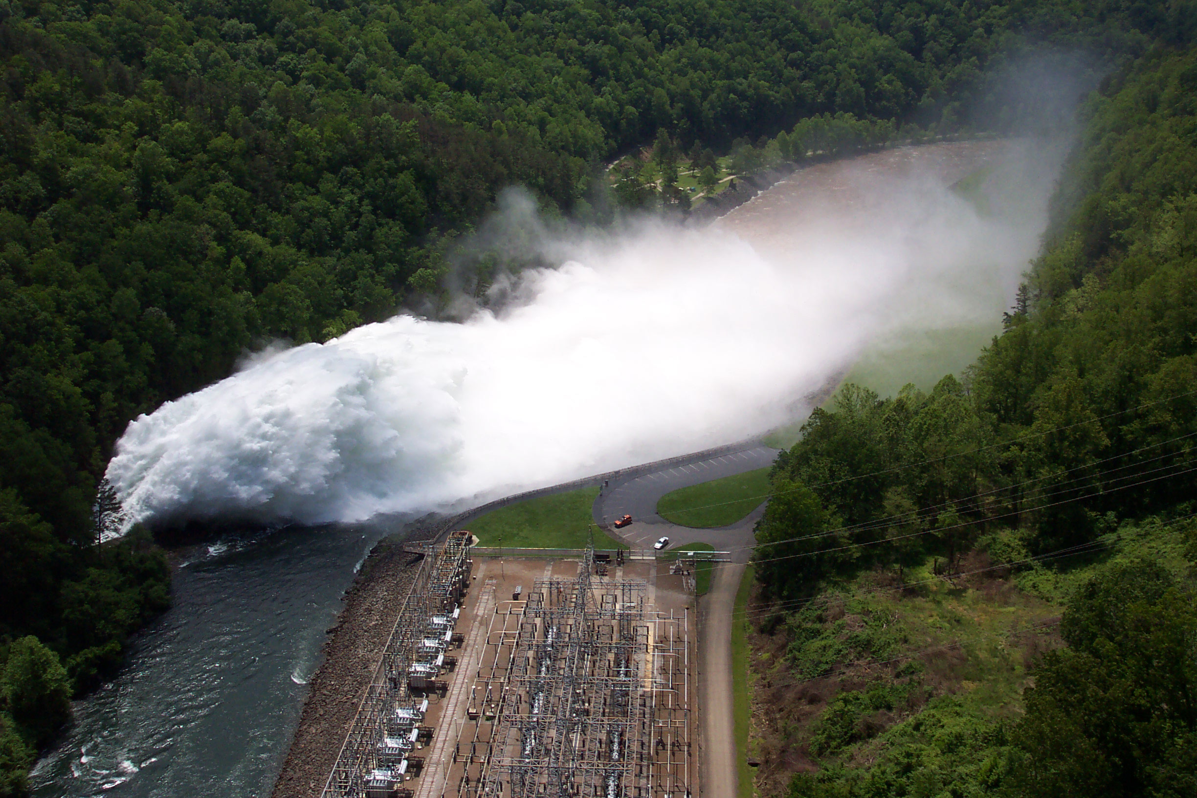 Fontana Dam.